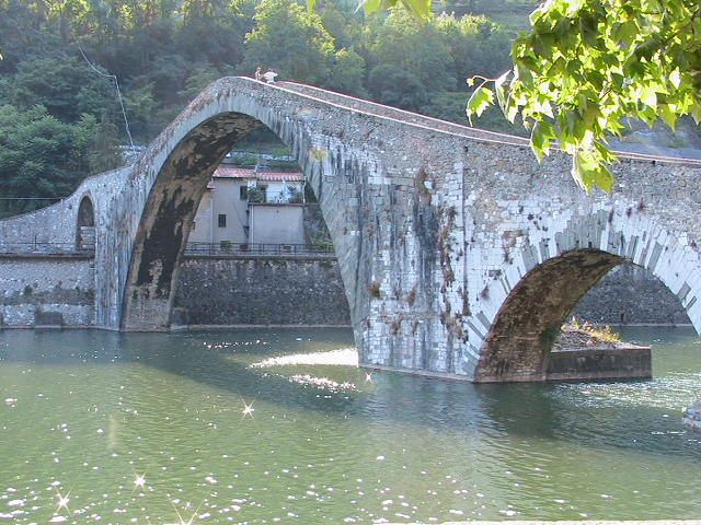 Most diabła w Borgo a Mozzano - XIVw.